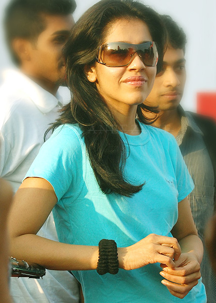 ഐഡിയ സ്റ്റാർ സിംഗർ അവതാരക രഞ്ജിനി ഹരിദാസ്